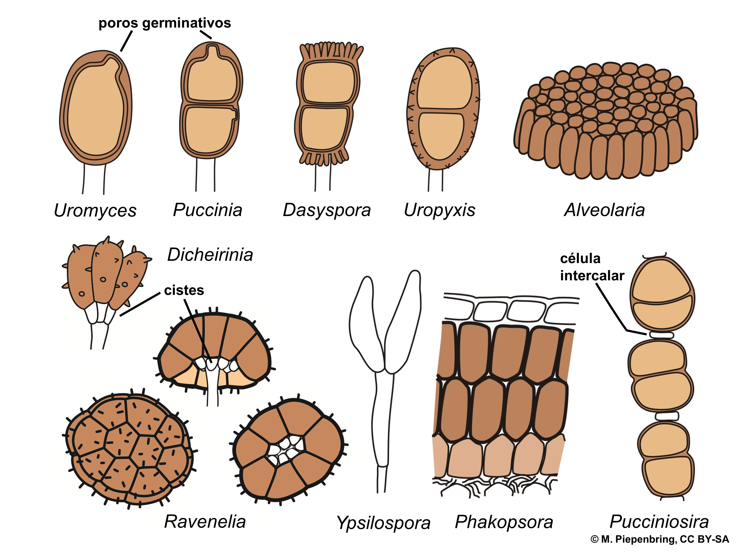 Biologische Schemata, gezeichnet und freigegeben von M. Piepenbring